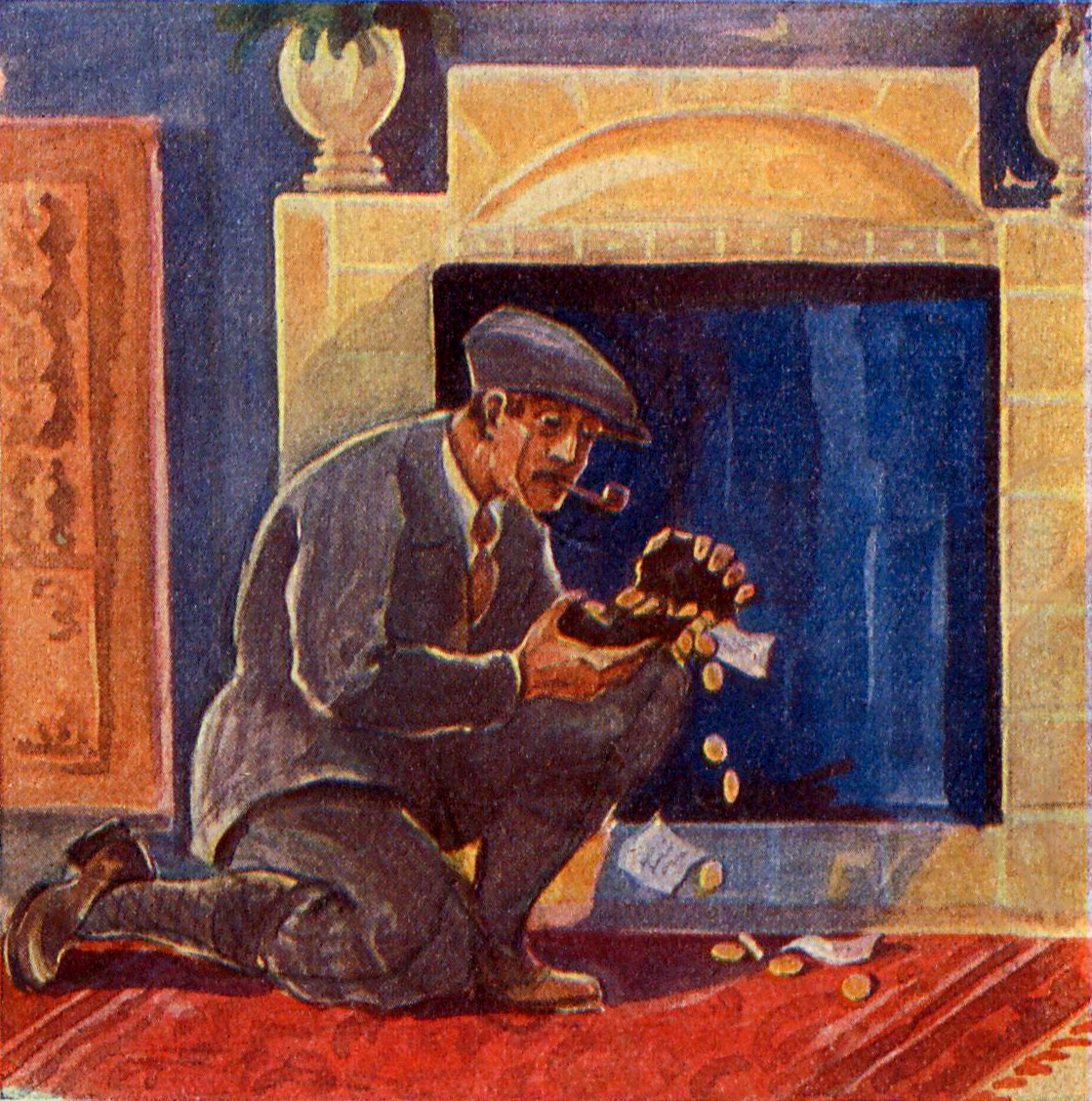 Ilustracja na okładce książki Bezbarwne żyjątka (org. niem. Die farblosen Tiere) z serii Nowy Nick Carter.